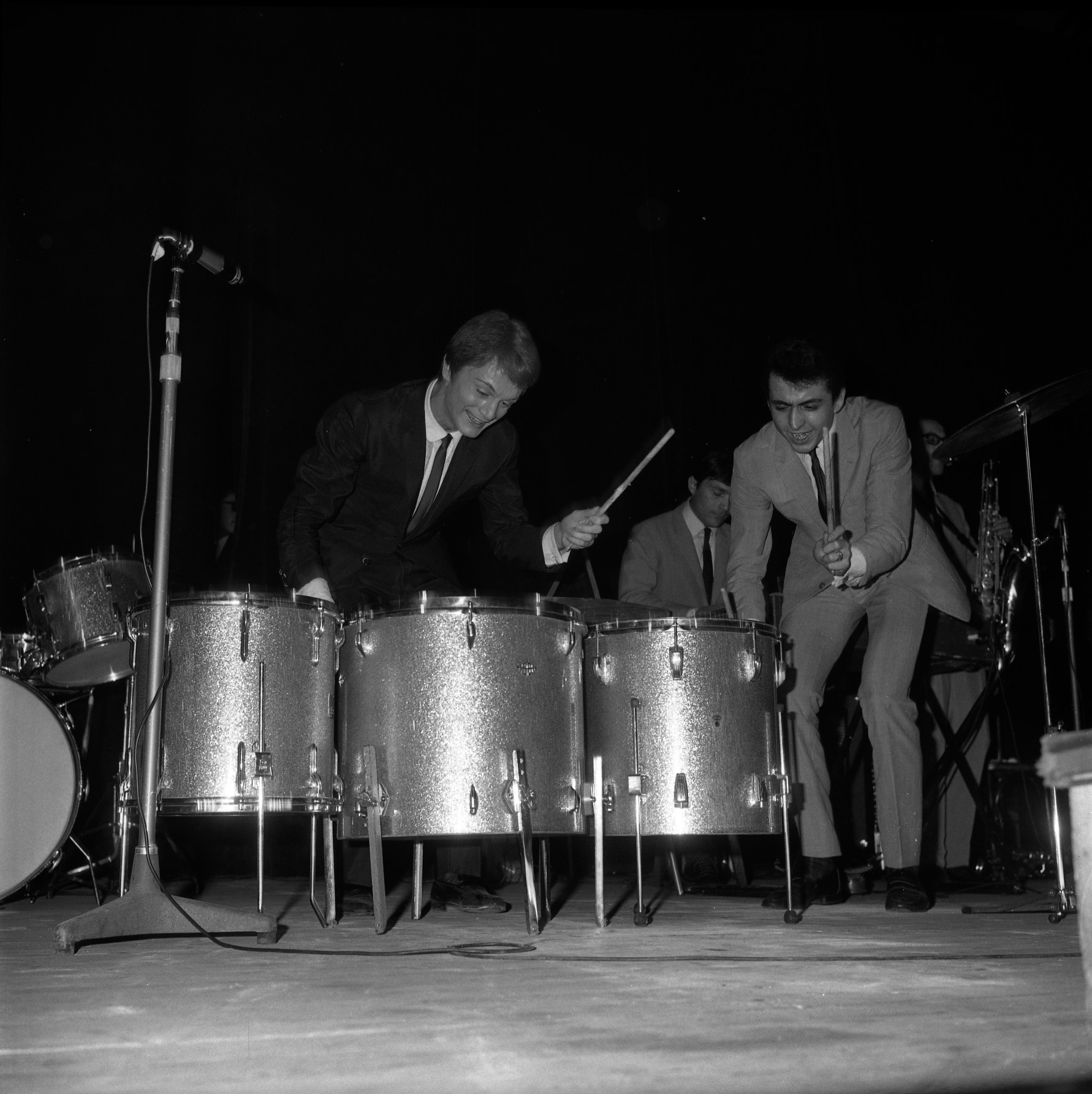 Palais des sports (place Dupuy). Le 20 novembre 1965. Plan sur scène de Claude François jouant de la batterie, à l'occasion d'une soirée de gala. Observation: Soirée grand gala music-hall au Palais des sports (Place dupuy), avec les chanteurs Claude François en vedette, hervé Villard, Michèle Torr, Gaston (meilleur saxophoniste de france) et le groupe les "Gardians".